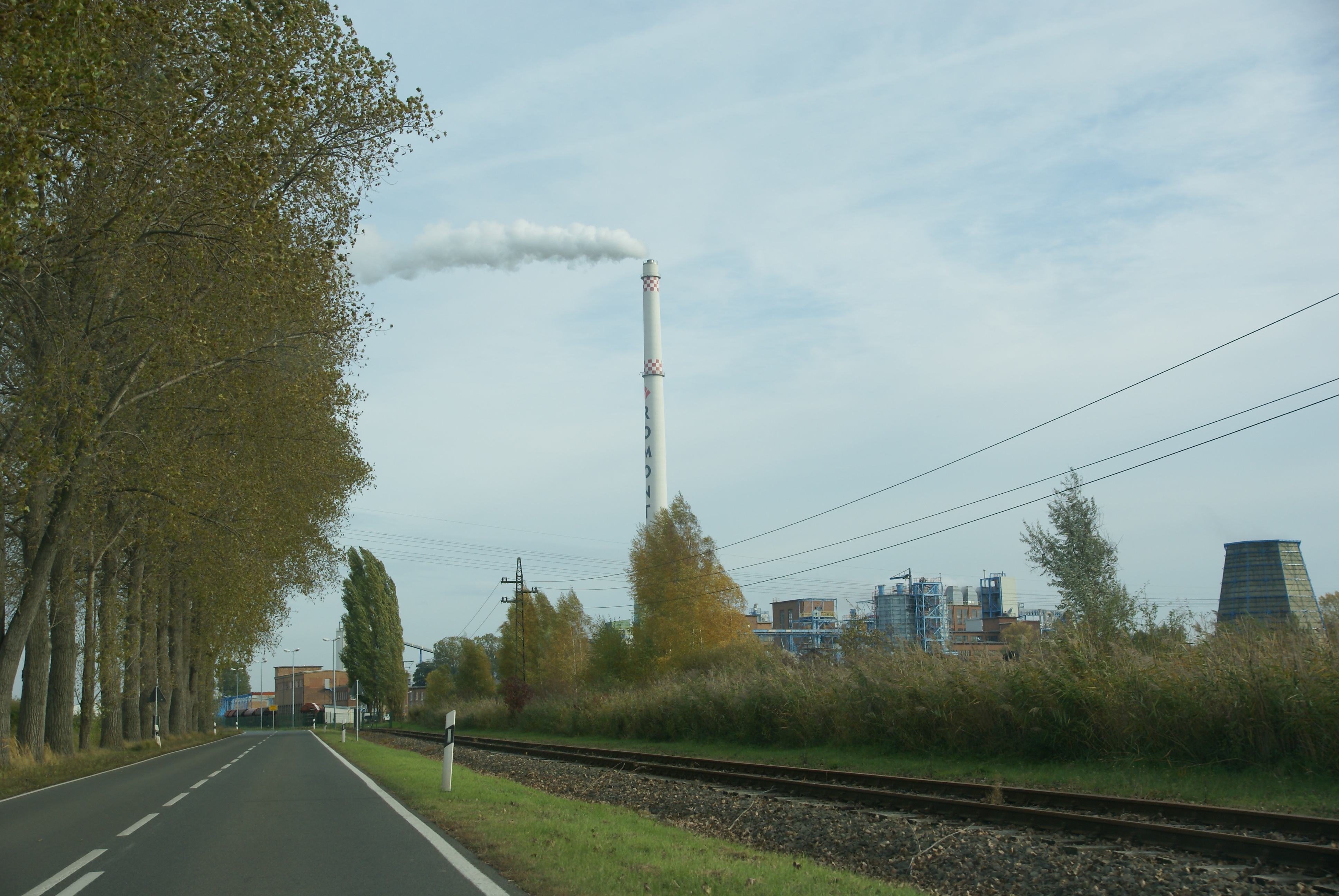 Der Turm der Romonta Fabrik in Amsdorf im Landkreis Mansfeld-Südharz